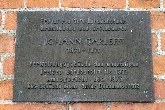 Hinweis auf den Architekten Garleff am Alten Kreishaus Bordesholm